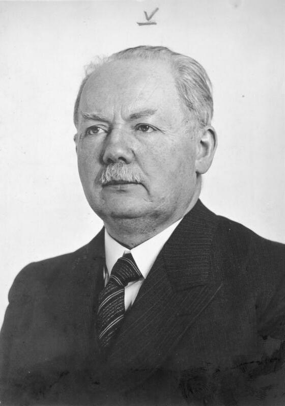 Scherl Prof. Dr. Otto Reche, Direktor des Instituts für Rassen- und Völkerkunde (Leipzig) 60 Jahre alt. 6582-39